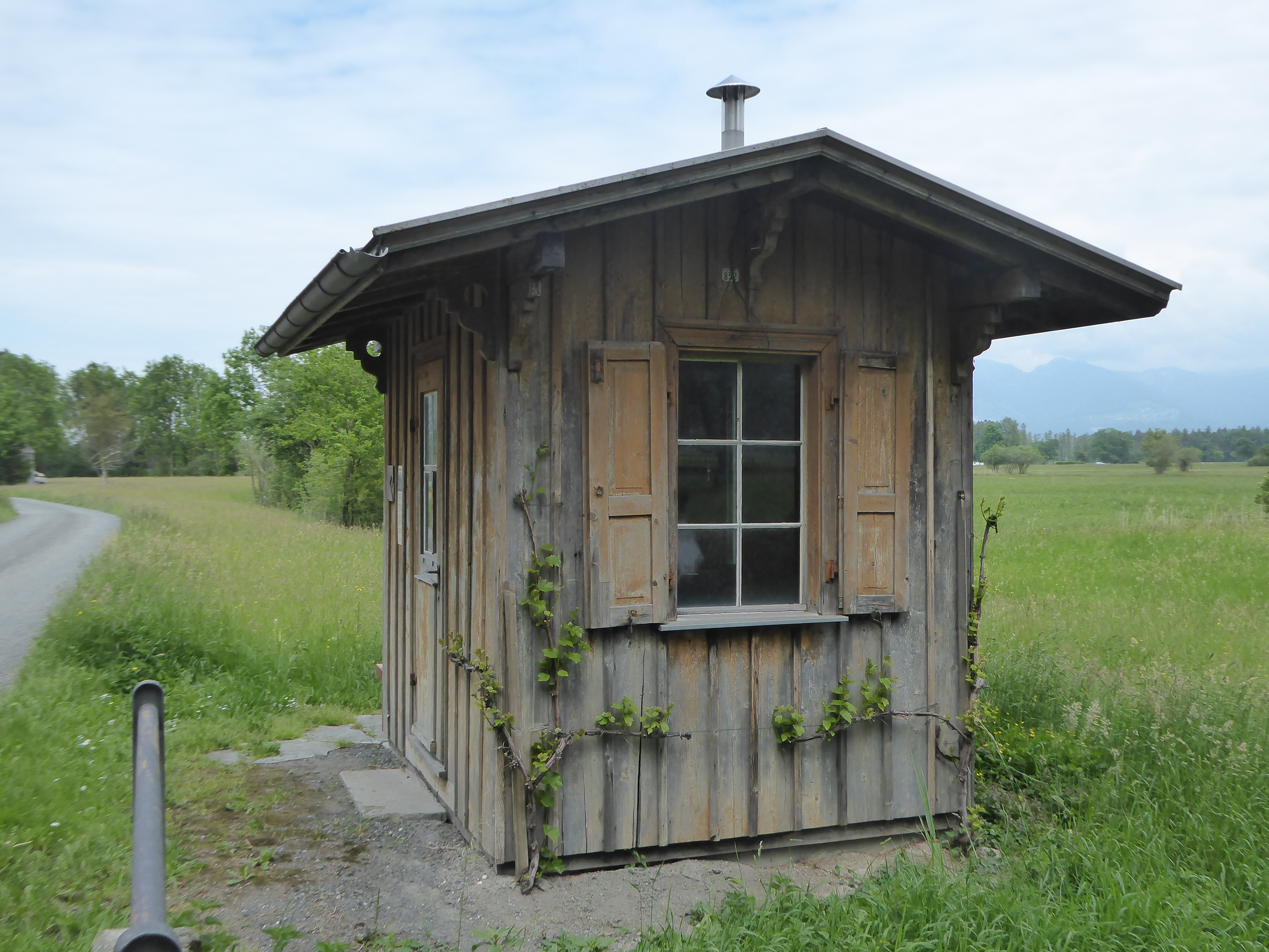 Schutzhütte für Grenzwächter im Ruggeller Riet FL.Weitere Informationen